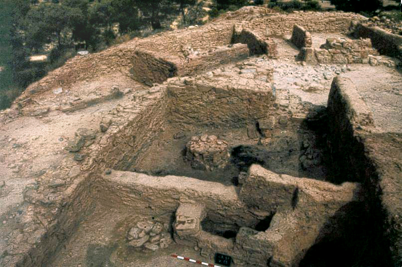 Talleres metalúrgicos del Castellet de Bernabé.